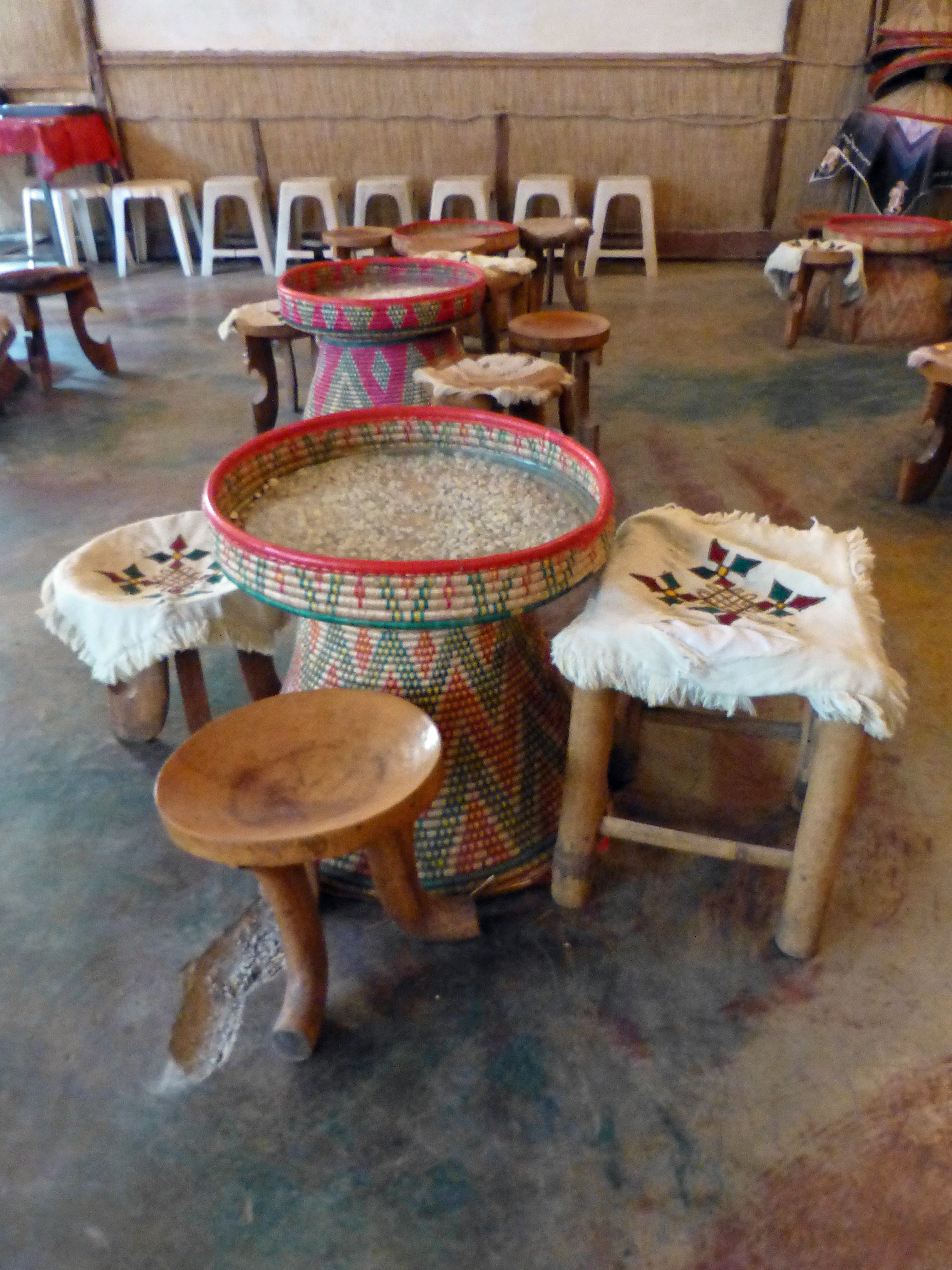 Restaurant traditionnel à Addis-Abeba (Ethiopie)